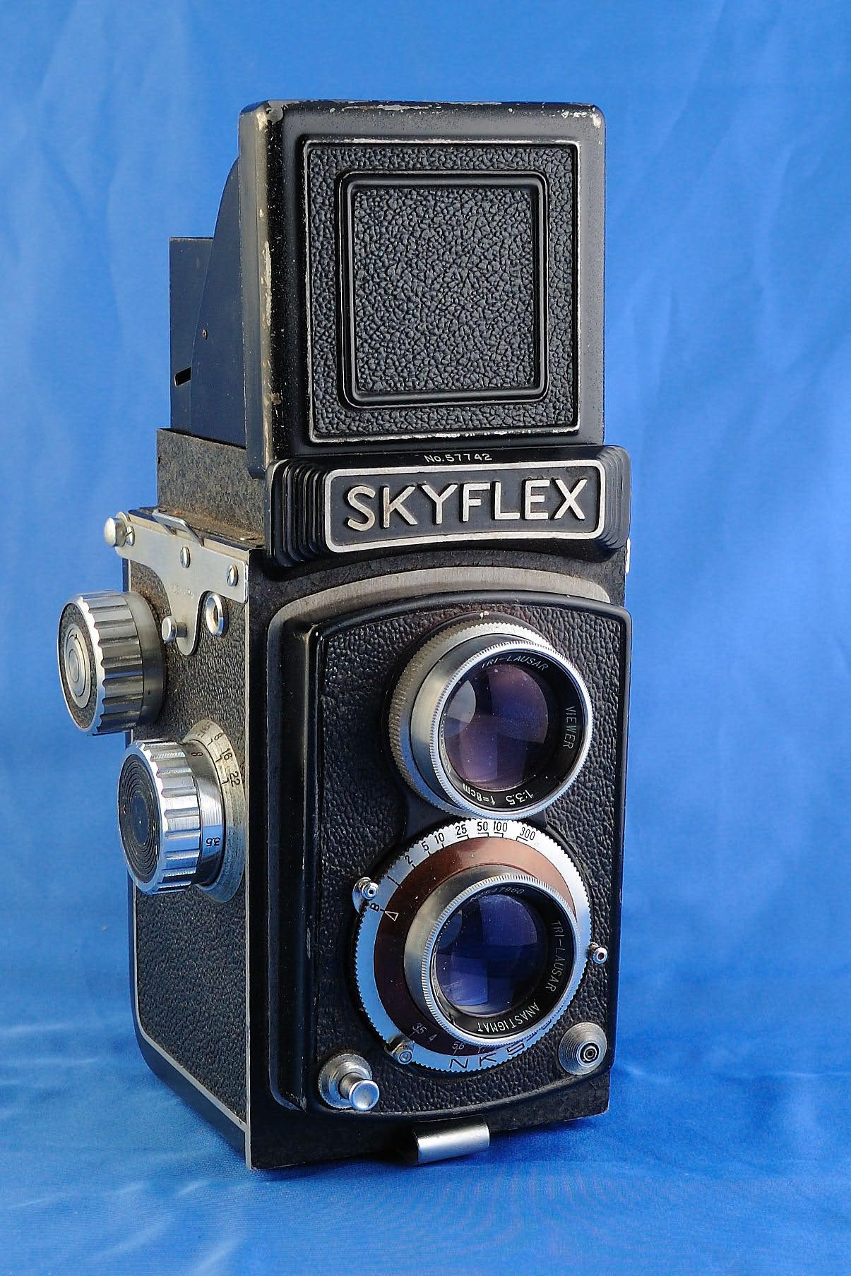 Skyflex TLR Camera